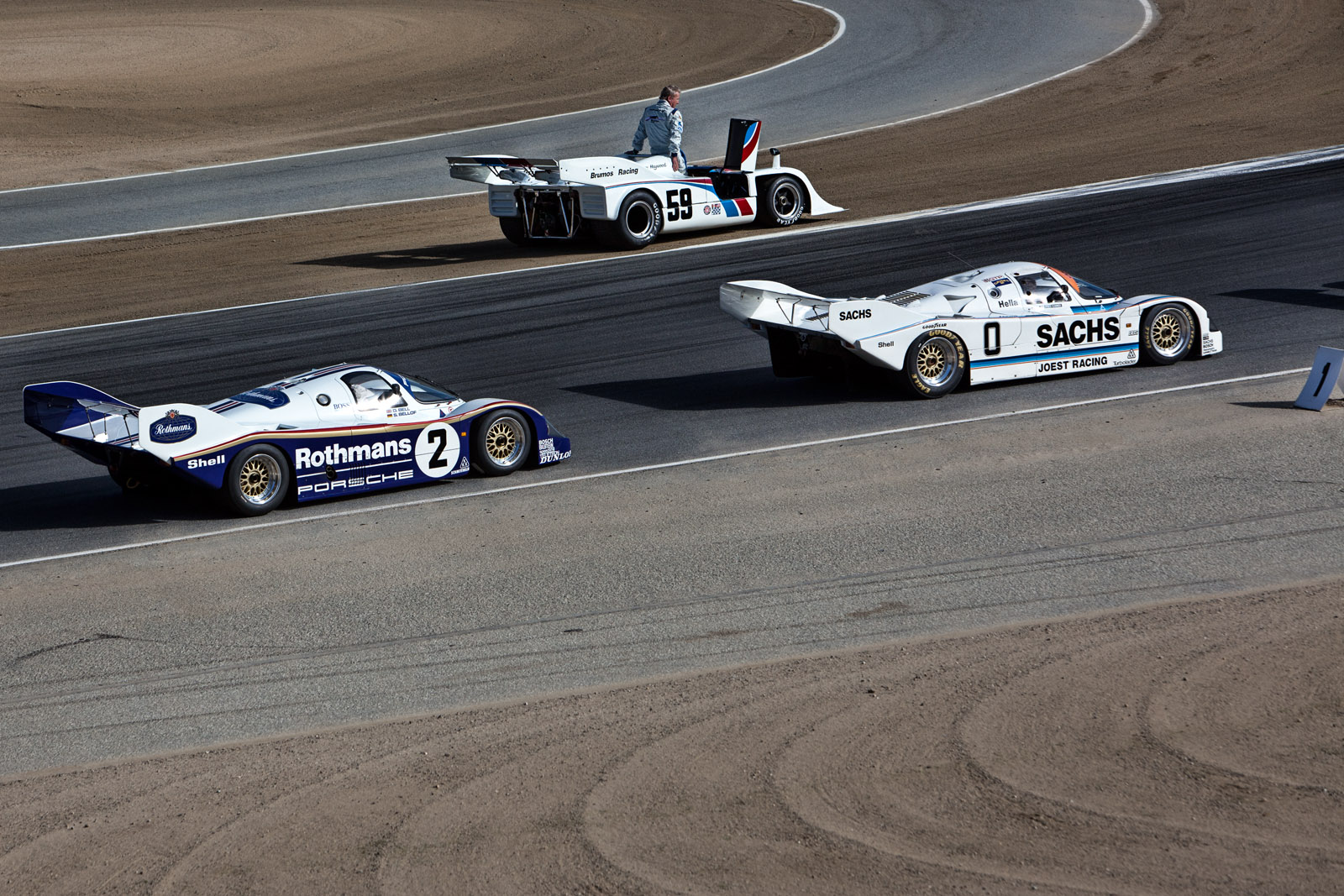 Porsche Rennsport Reunion IV